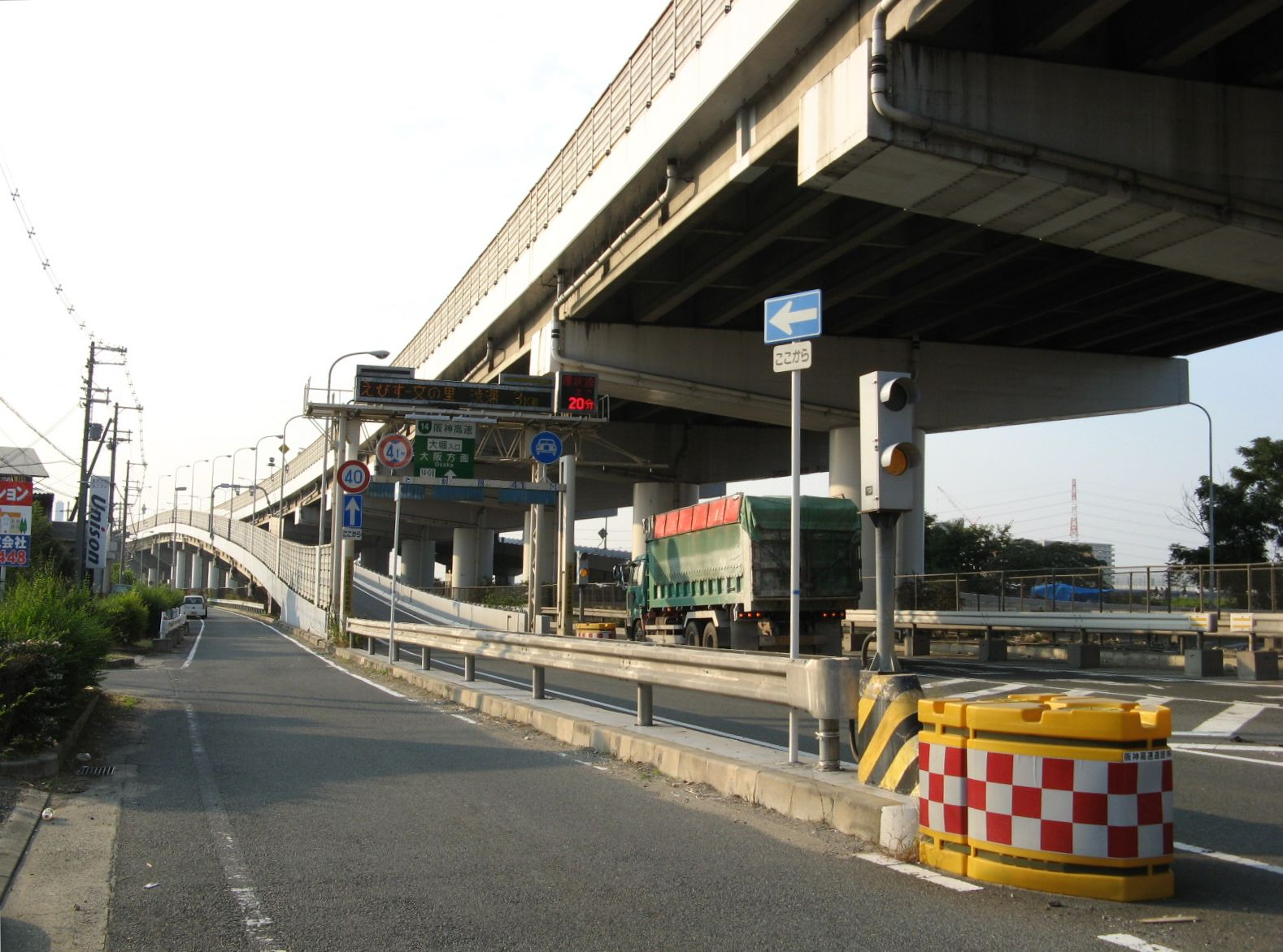 阪神高速大堀出入口